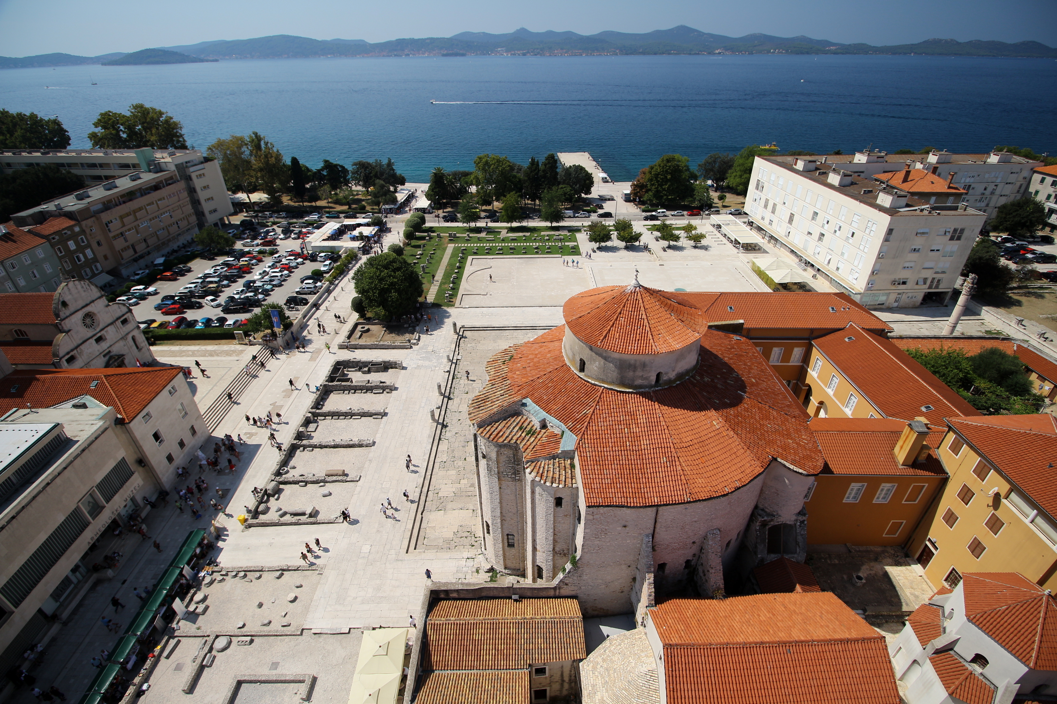 Kostel svatého Donáta a římské fórum v Zadaru